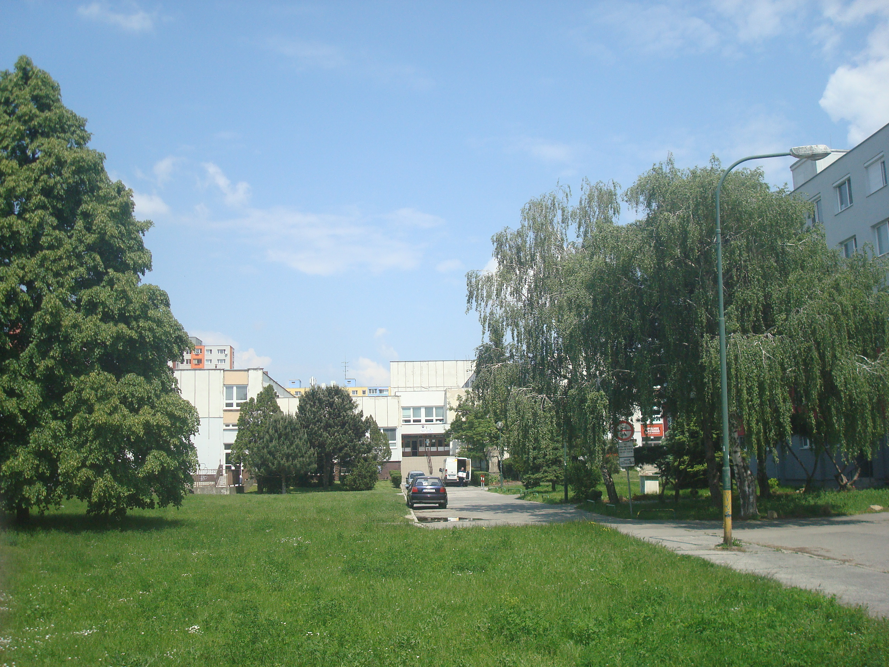 Elementary school Holíčska 50, Petržalka, Bratislava, Slovakia